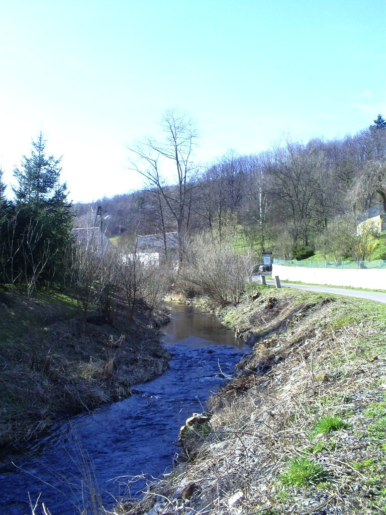 Rzeka Nysa Mała w Grobli